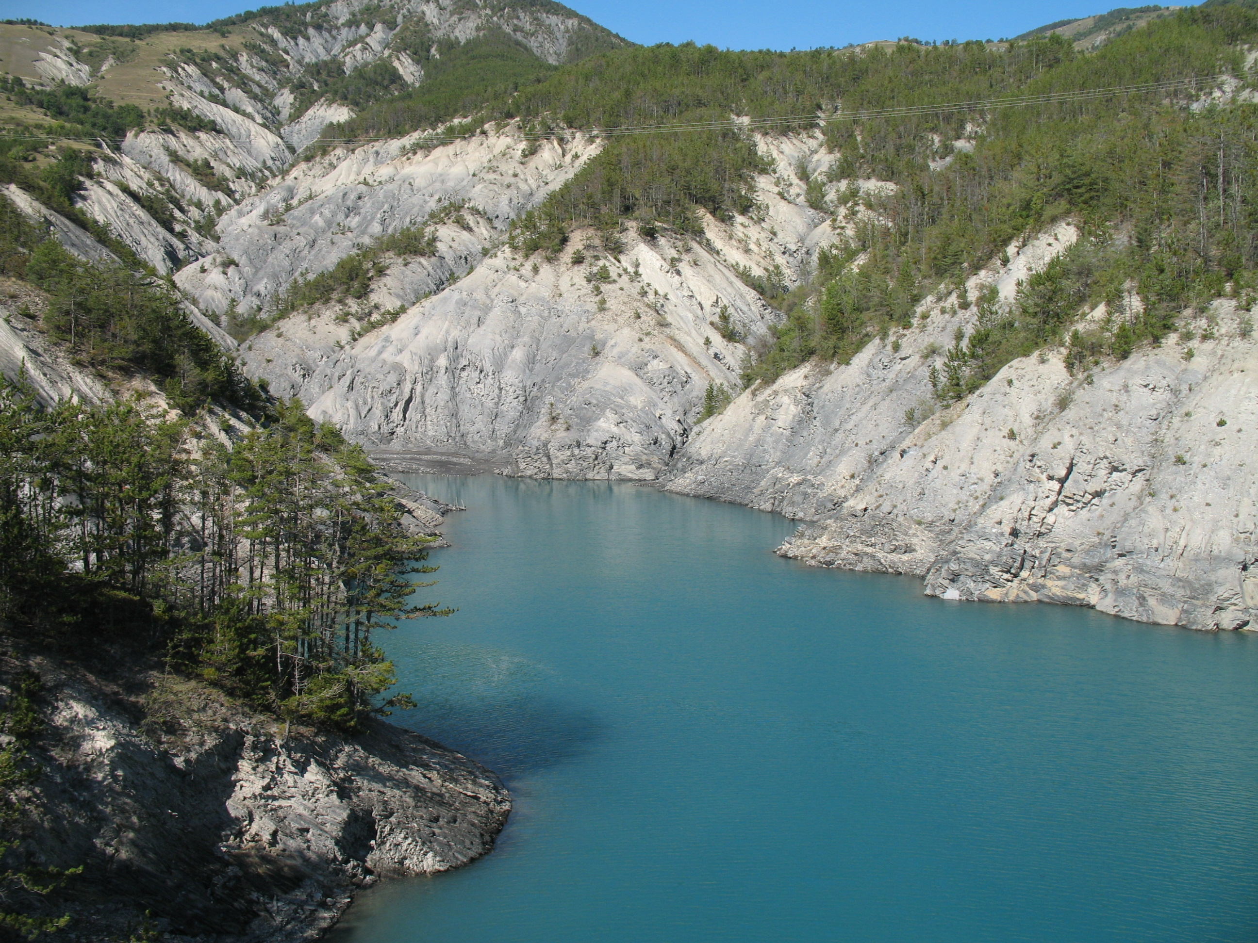 Lac de Serre-Ponçon